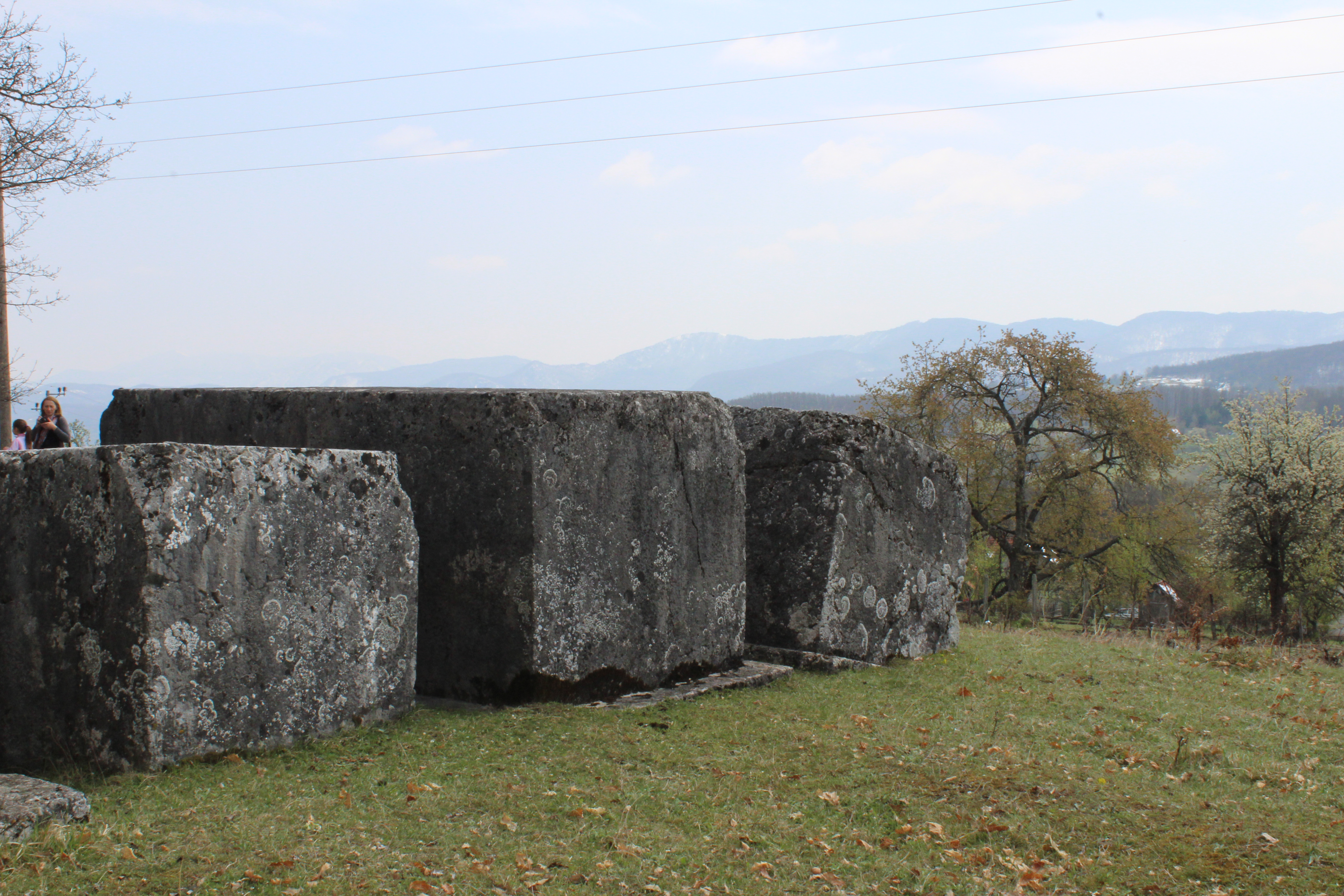 Stećci u Lađevinama u Rogatici.